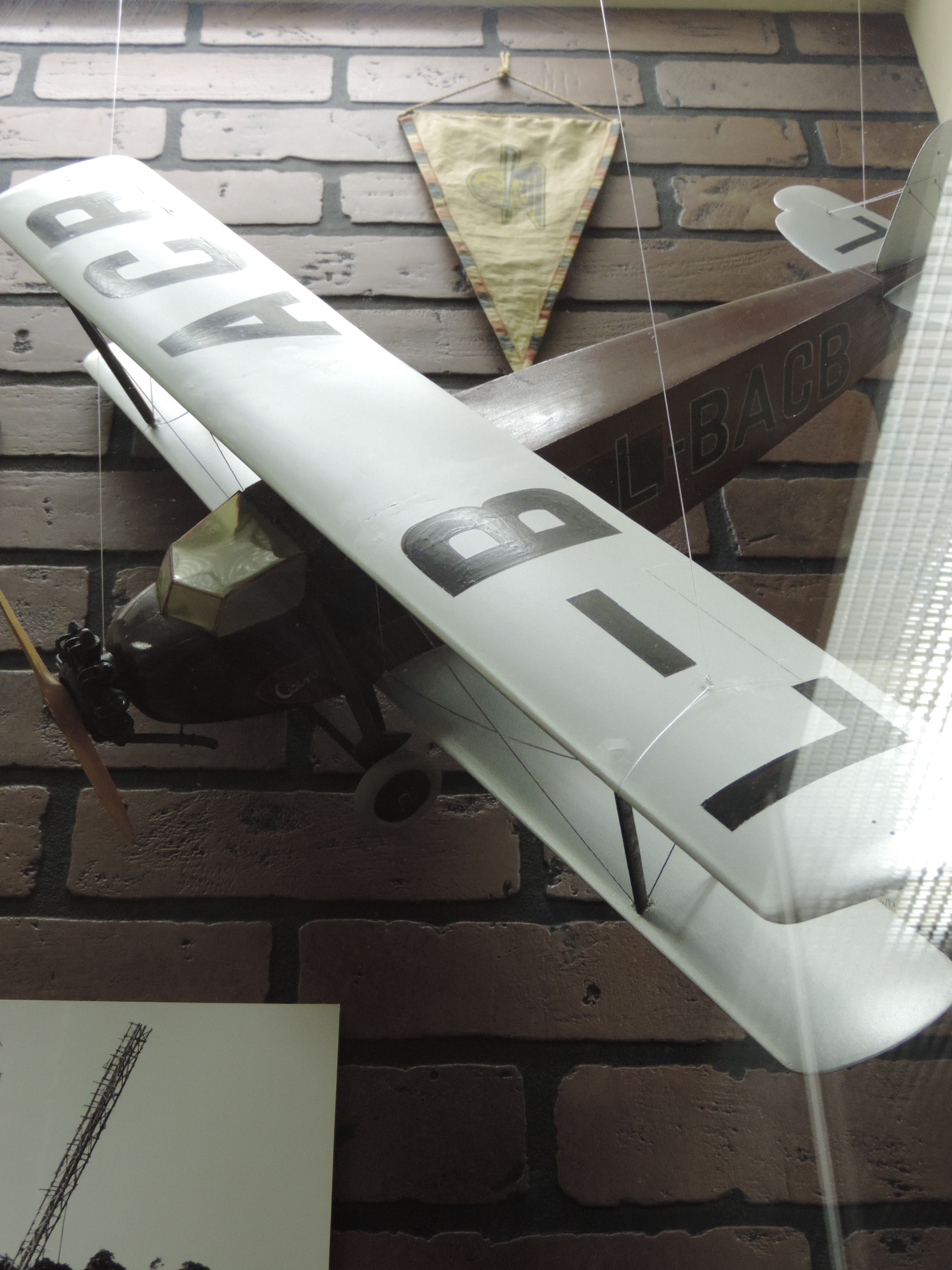 Aero A-38 im Flugzeugmuseum Kbely